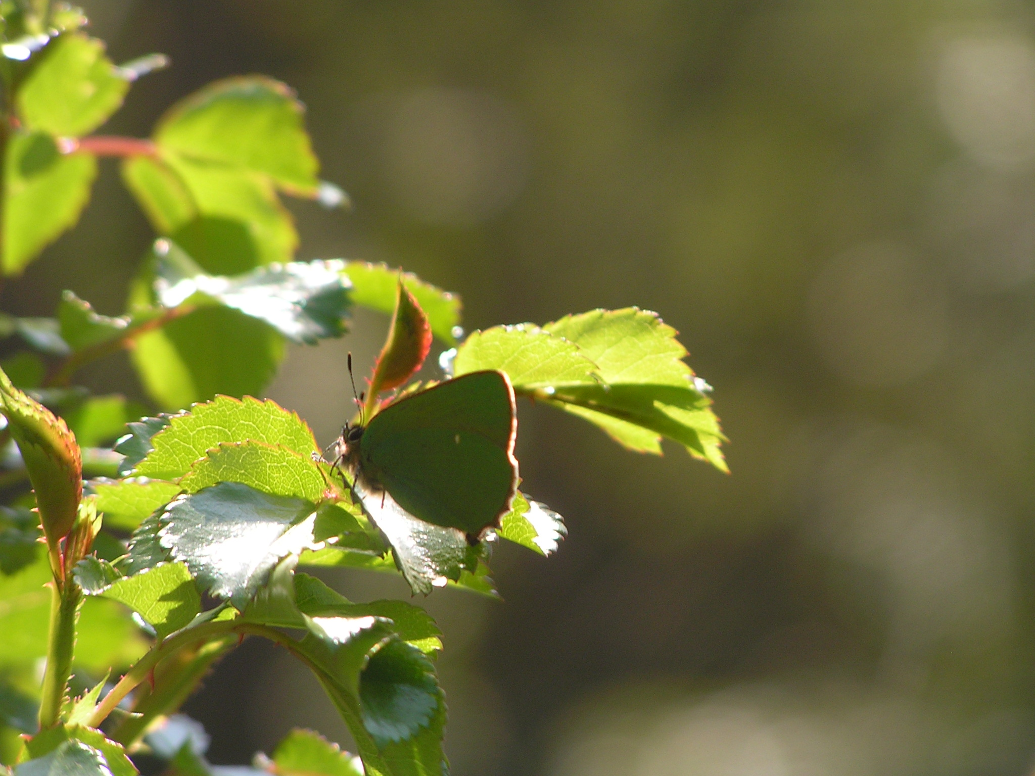 argus vert ou thecla de la ronce ce jour à Champblanc commune de Cherves-Richemont en Charente en France